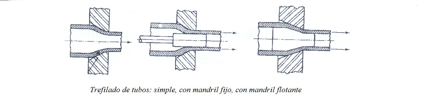 imagen que describe los diferentes mandriles para el trefilado